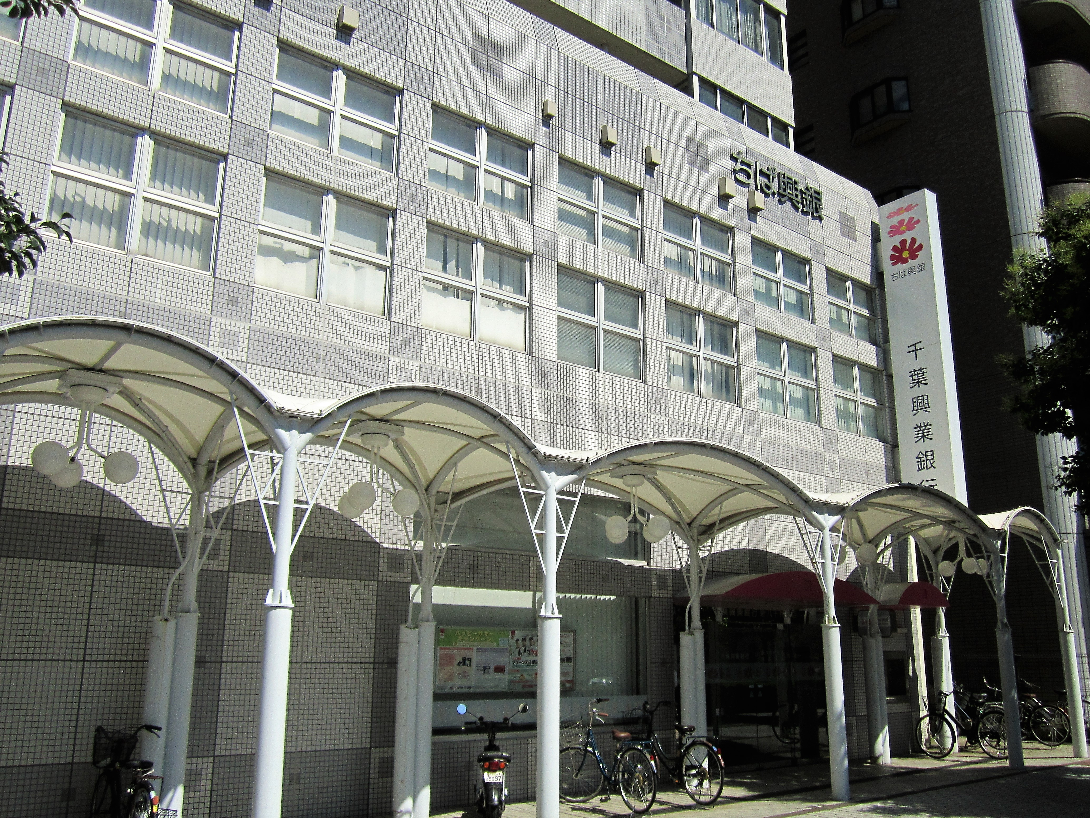 千葉興業銀行新八千代支店・米本支店（八千代市ゆりのき台）